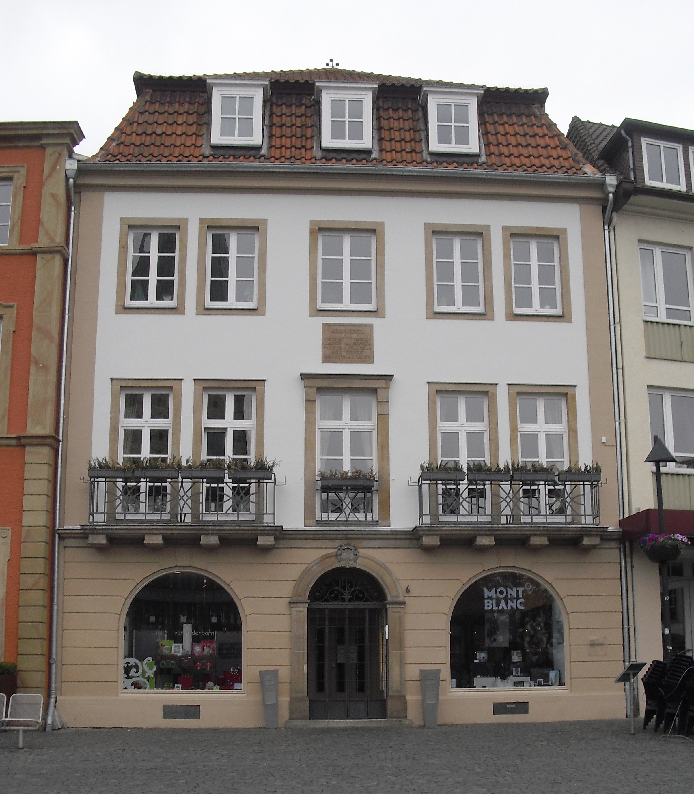 Markt 6, Paderborn This is the photograph of an architectural monument. It is part of the list of cultural monuments of Paderborn, no. 110